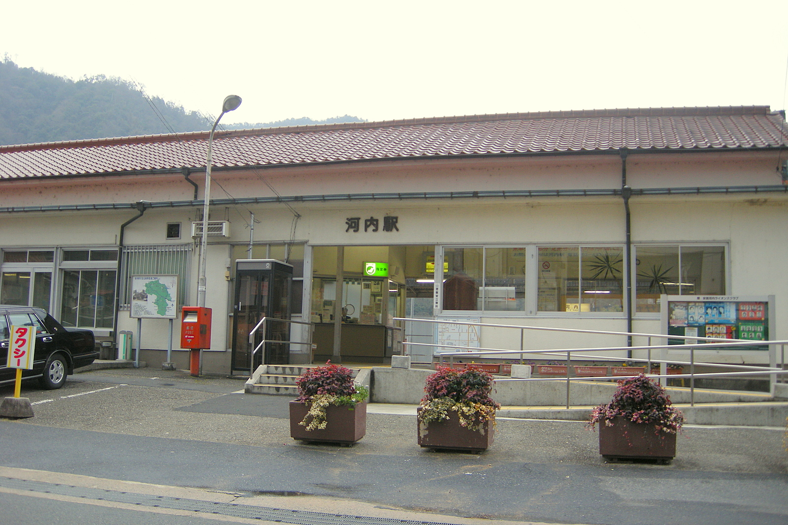 河内駅 kouchi Station